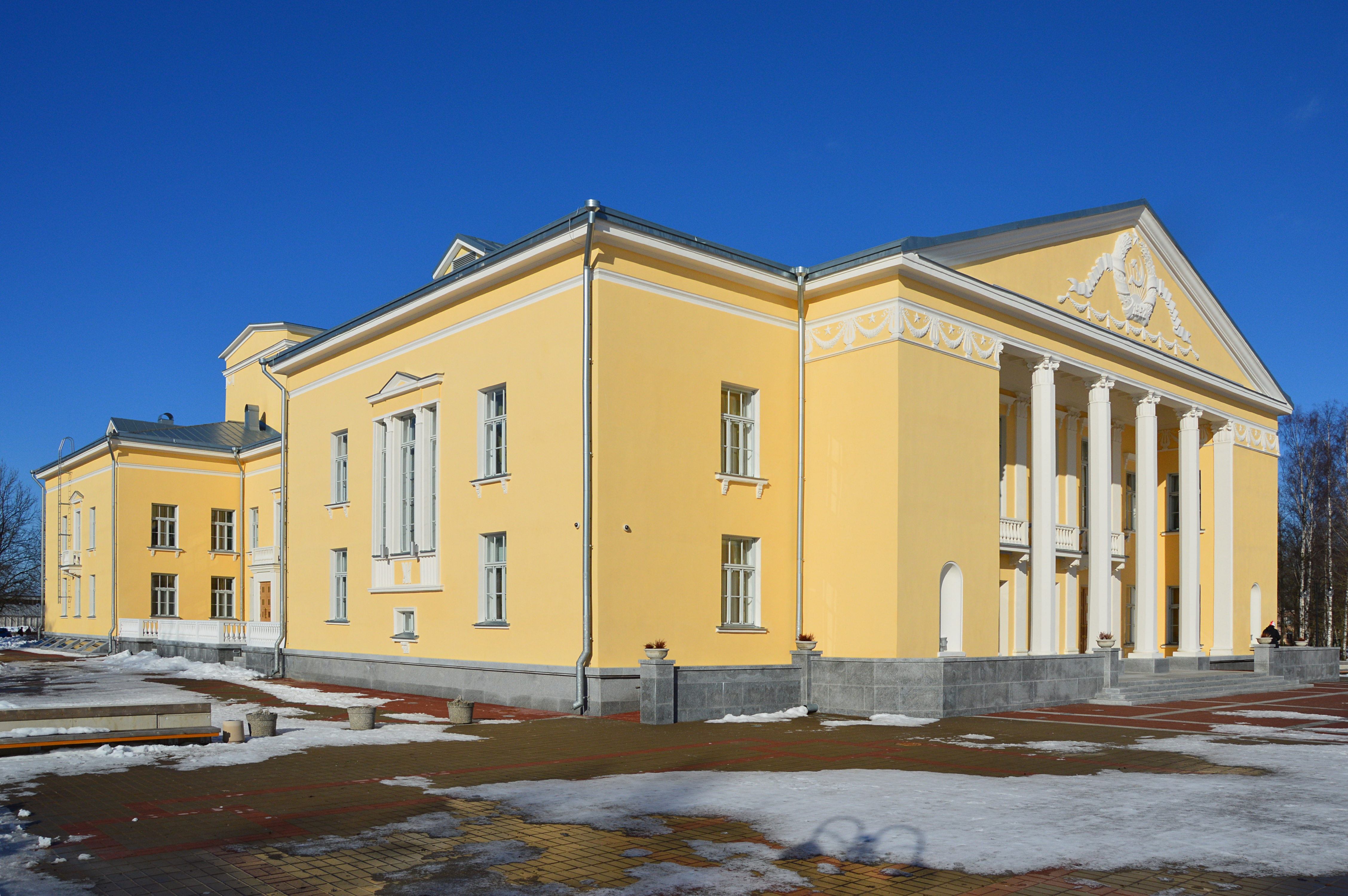 Kohtla-Järve Kultuurimaja.